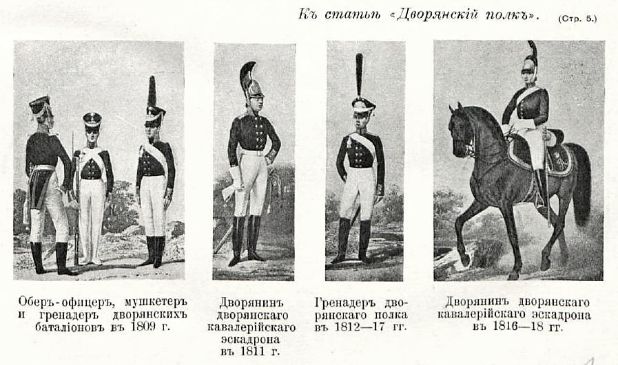 Эти изображения были использованы для иллюстрирования статьи «Дворянский полк» опубликованной в девятом томе «Военной энциклопедии», который был издан книгоиздательским товариществом И. Д. Сытина в 1912 году в столице Российской империи городе Санкт-Петербурге.